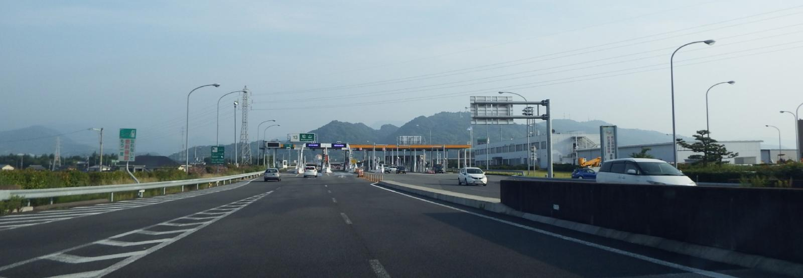 松山インターチェンジ入口